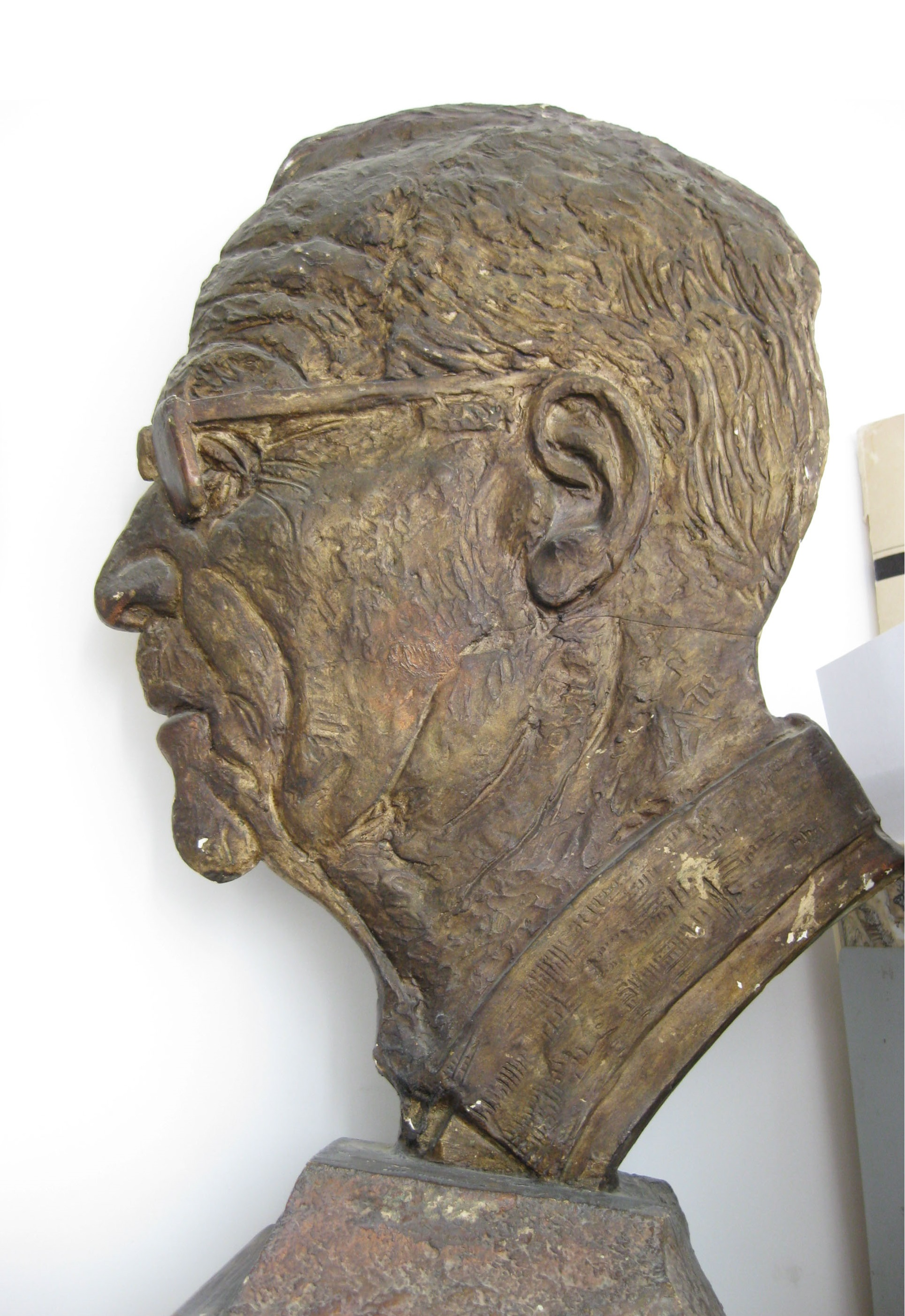 אליהו ירקוני - זקן המורים בבית הספר פיק"א, תבליט גבס מאת זאב צורנמל.